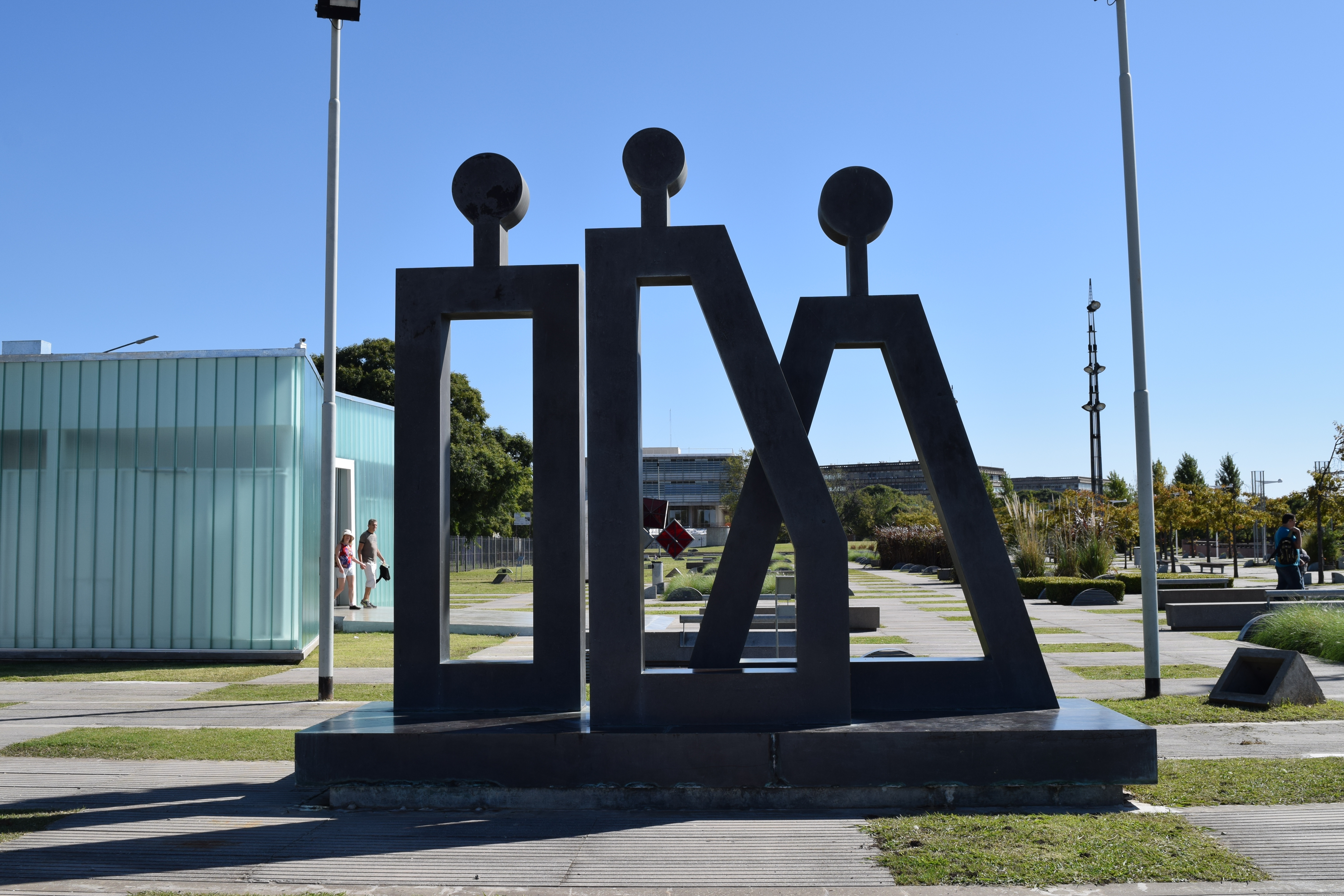 Sin título. 2003 | Bronce laminado: 3,90 x 5 x 1,70 m. Obra realizada a partir de un boceto del artista. Roberto Aizenberg.